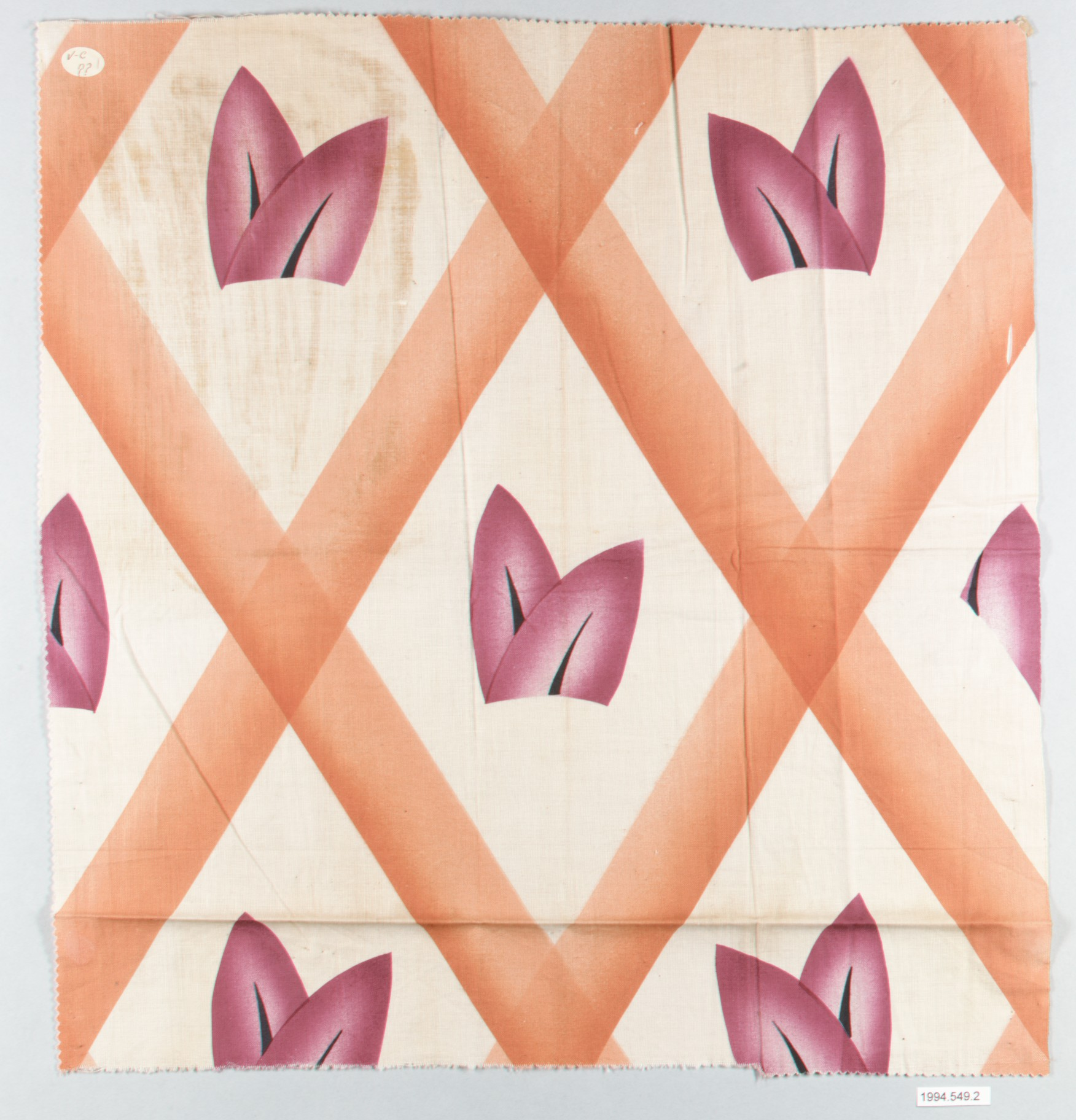 Textile sample; Textiles-Printed